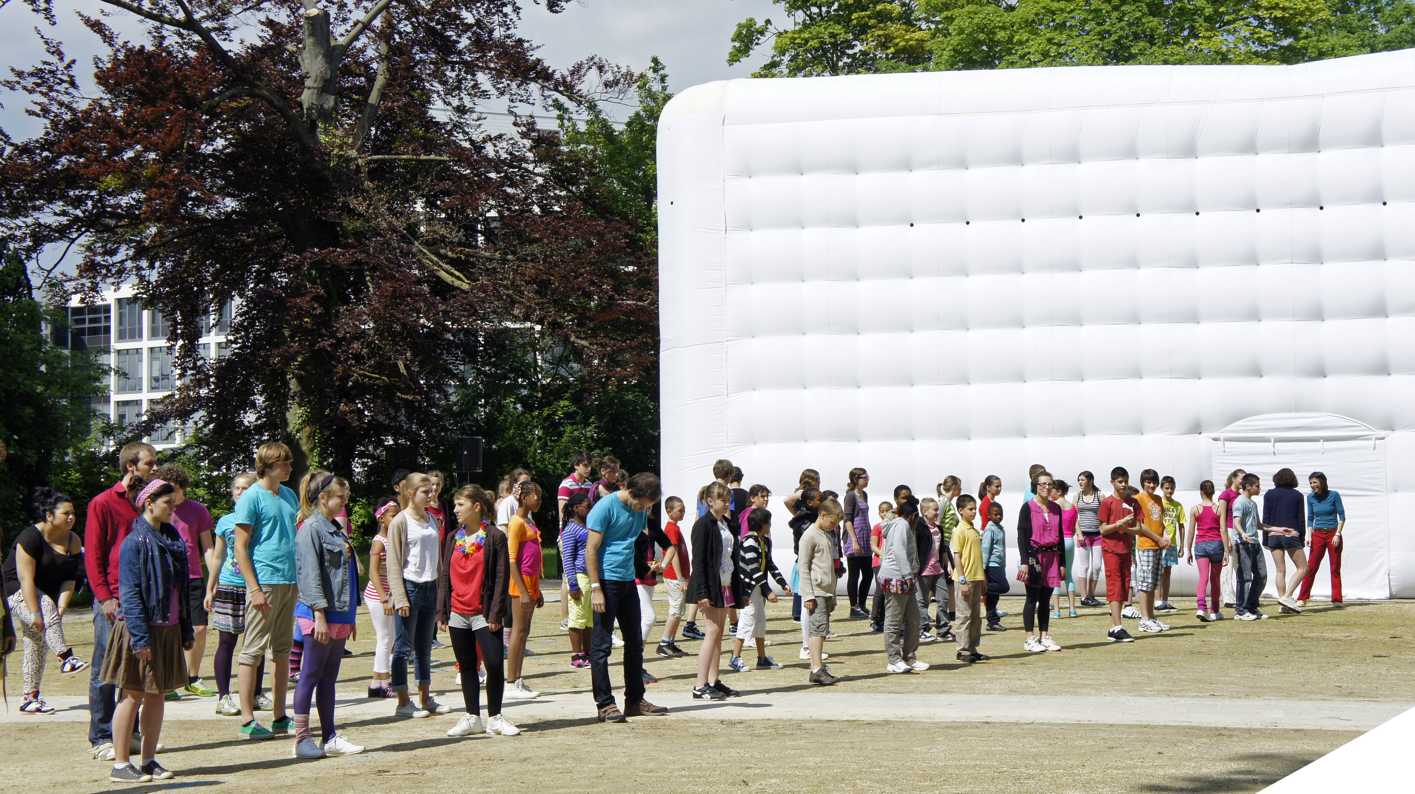 Reims – Les Sisyphe en action devant le glaçon de Big Little B. (Daniel Larrieu, chorégraphe)